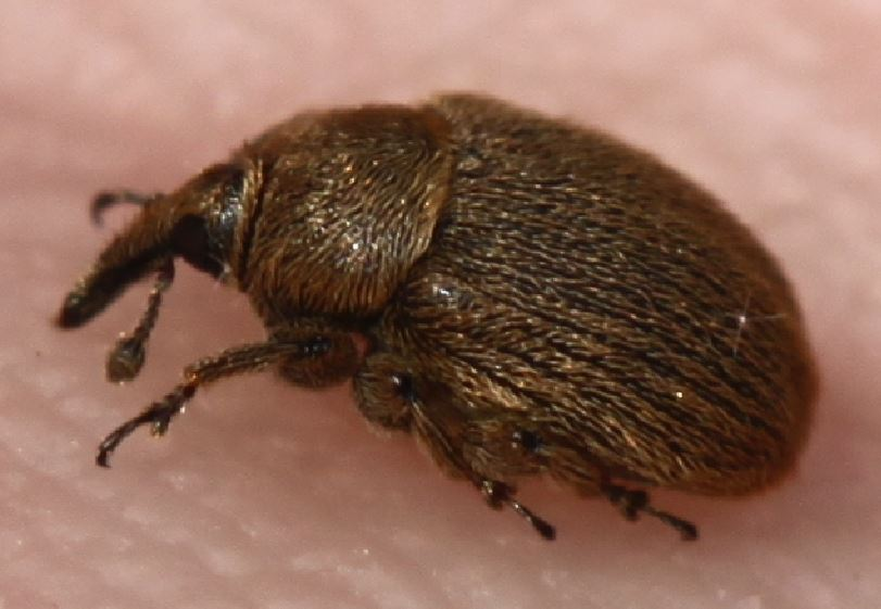 Rüsselkäfer Rhinusa tetra am 23. Mai 2018 in der Schwetzinger Hardt